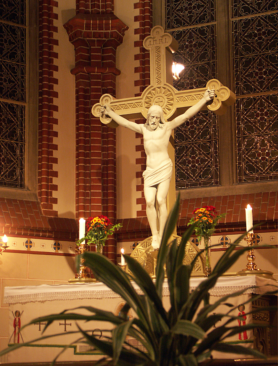 Krucifix i Eslövs kyrka i Lunds stift.